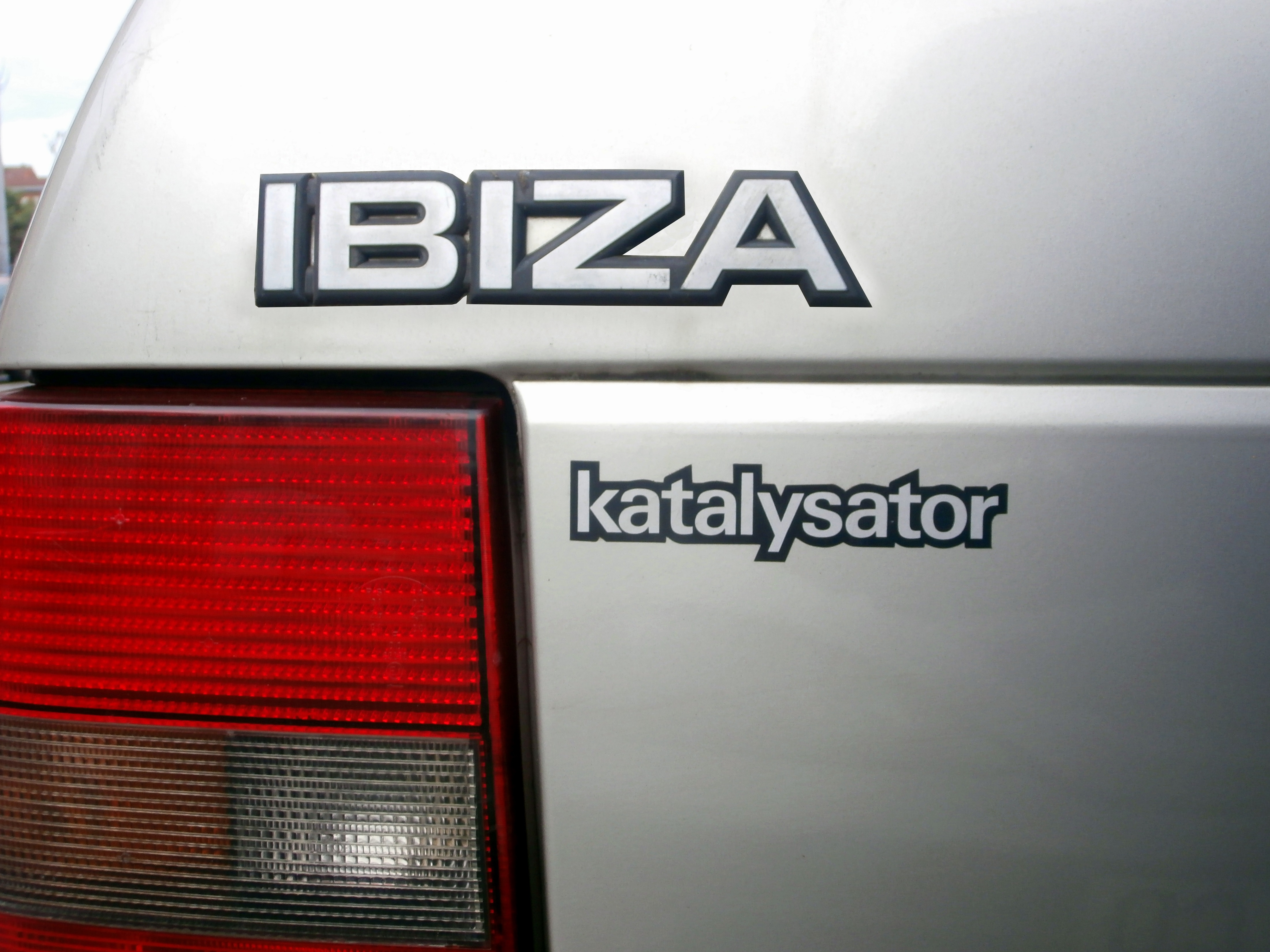 SEAT Ibiza I New Style Katalystor Emblema 1991